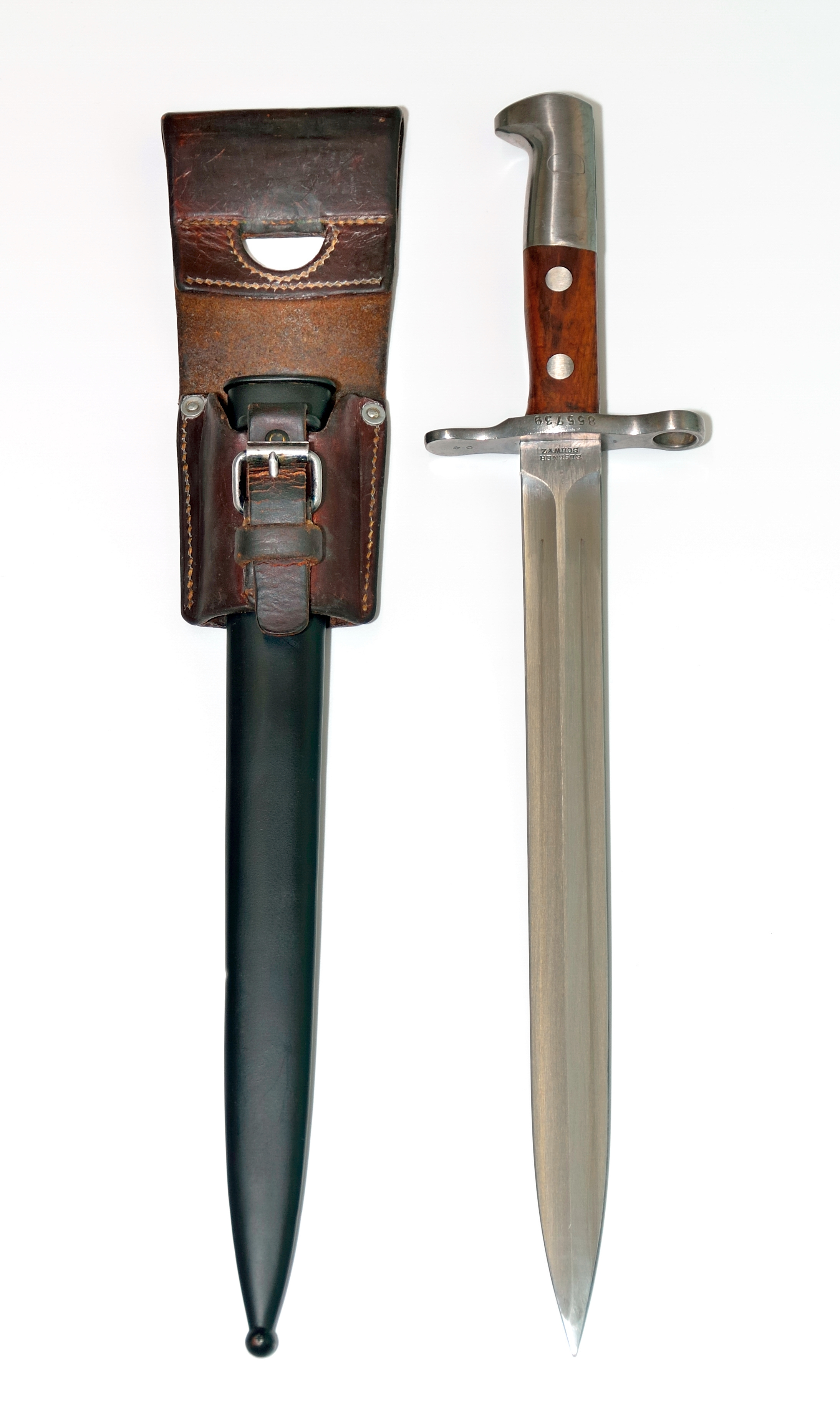 Baïonnette du mousqueton 31, mod. 1918